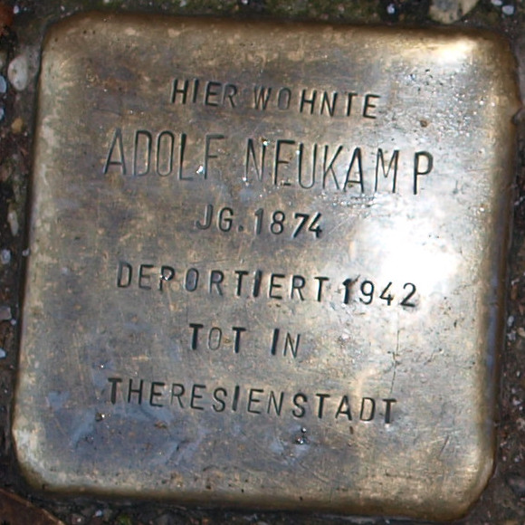 Stolperstein in Soest Grandweg 32, Adolf Neukamp